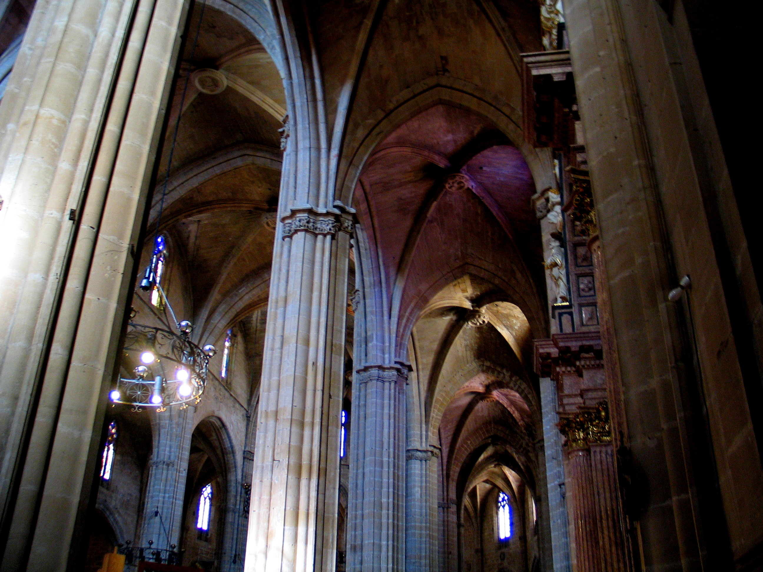 Interior de la catedral de Tortosa